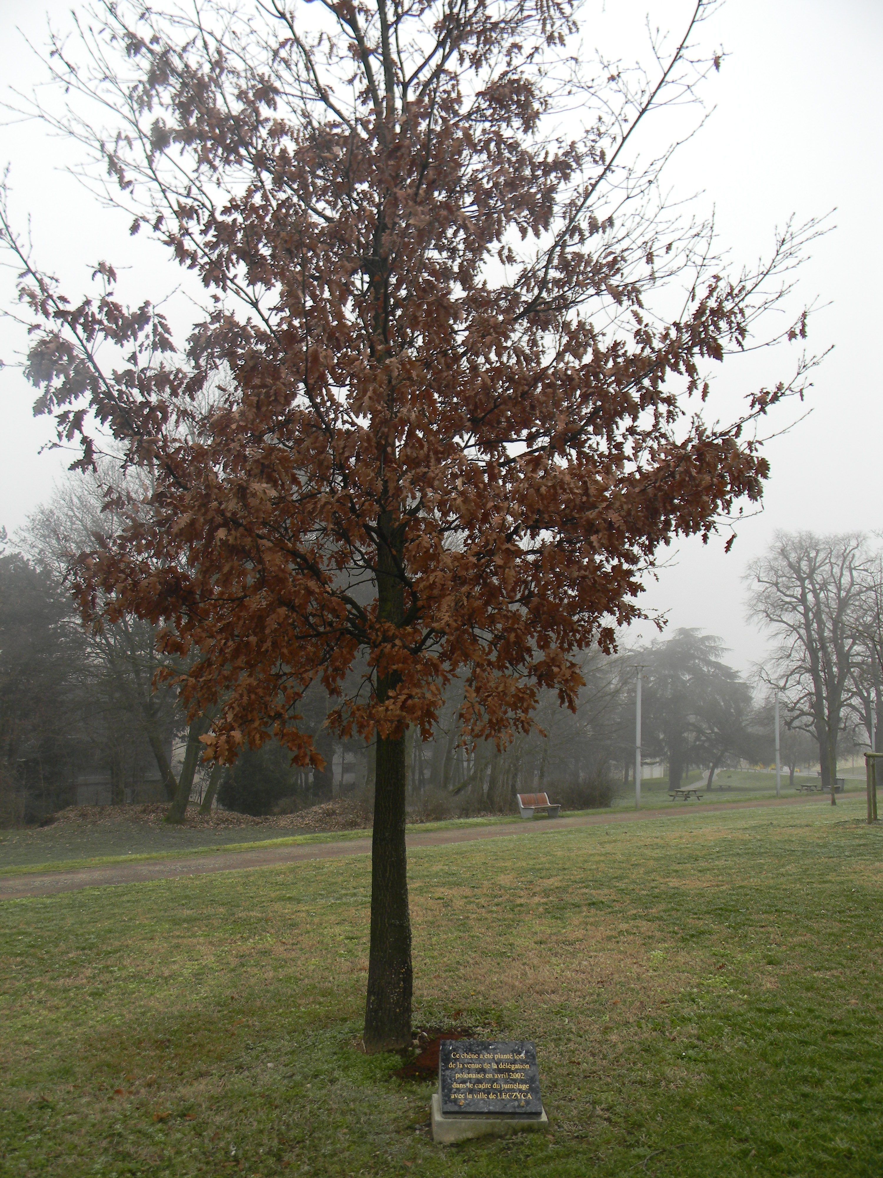 Ce chêne a été planté lors de la venue de la délégation polonaise en avril 2002 dans le cadre du jumelage avec la ville de Leczyca.